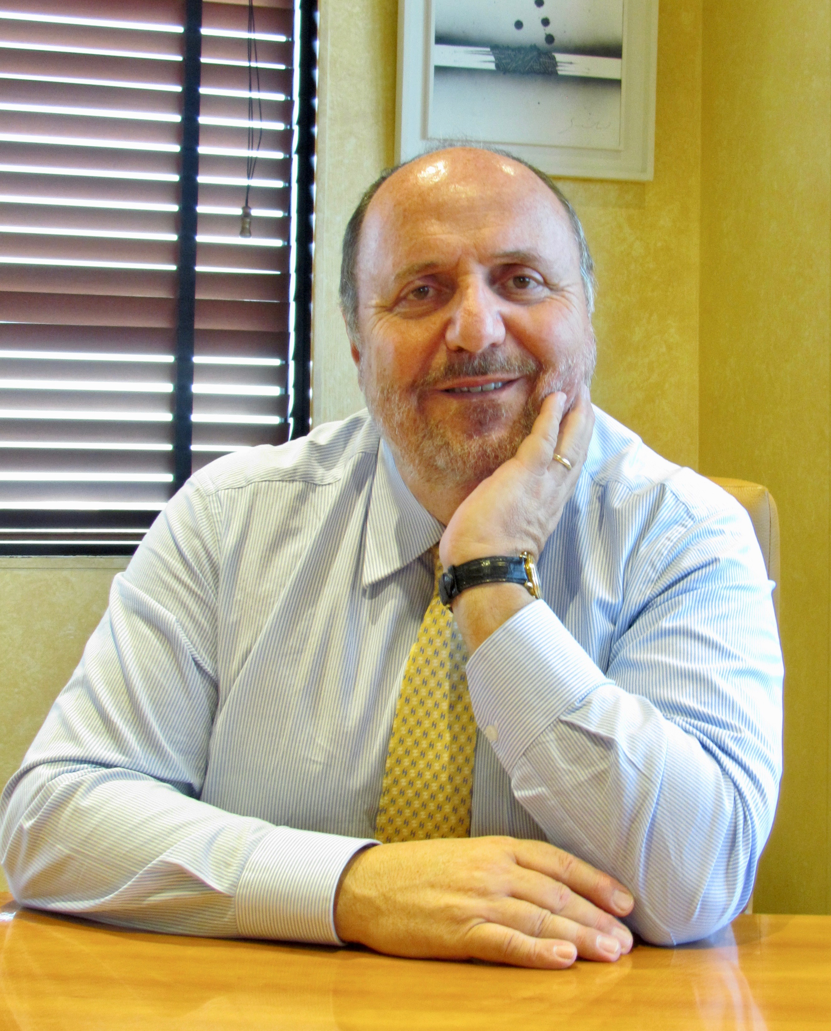 Valter Catoni nel suo ufficio